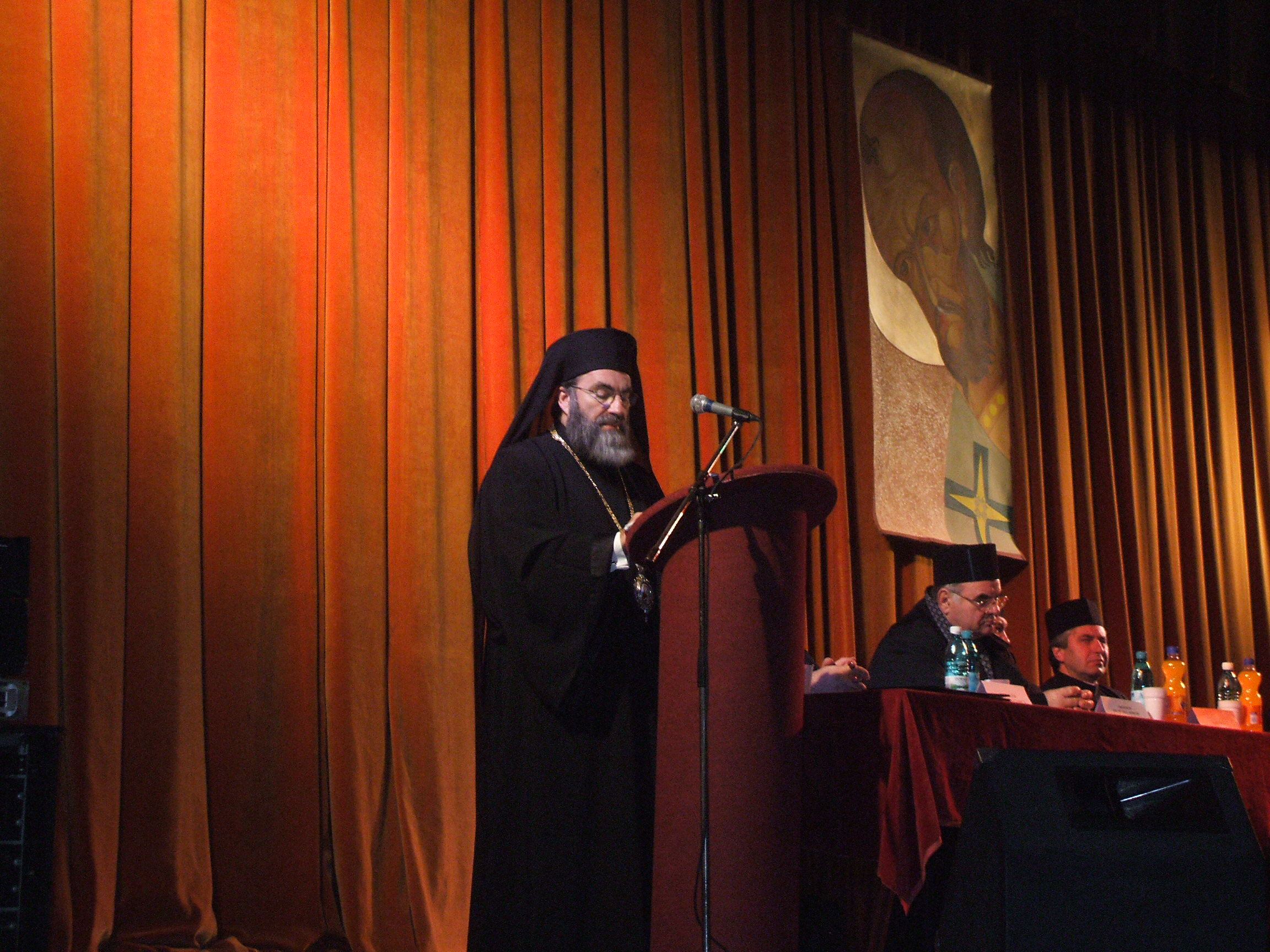 Aceasta imagine il prezinta PS Ioachim Bacauanul, sustinand Conferinta la Casa de Cultura Bacau. Fuji Film FinePixA700.